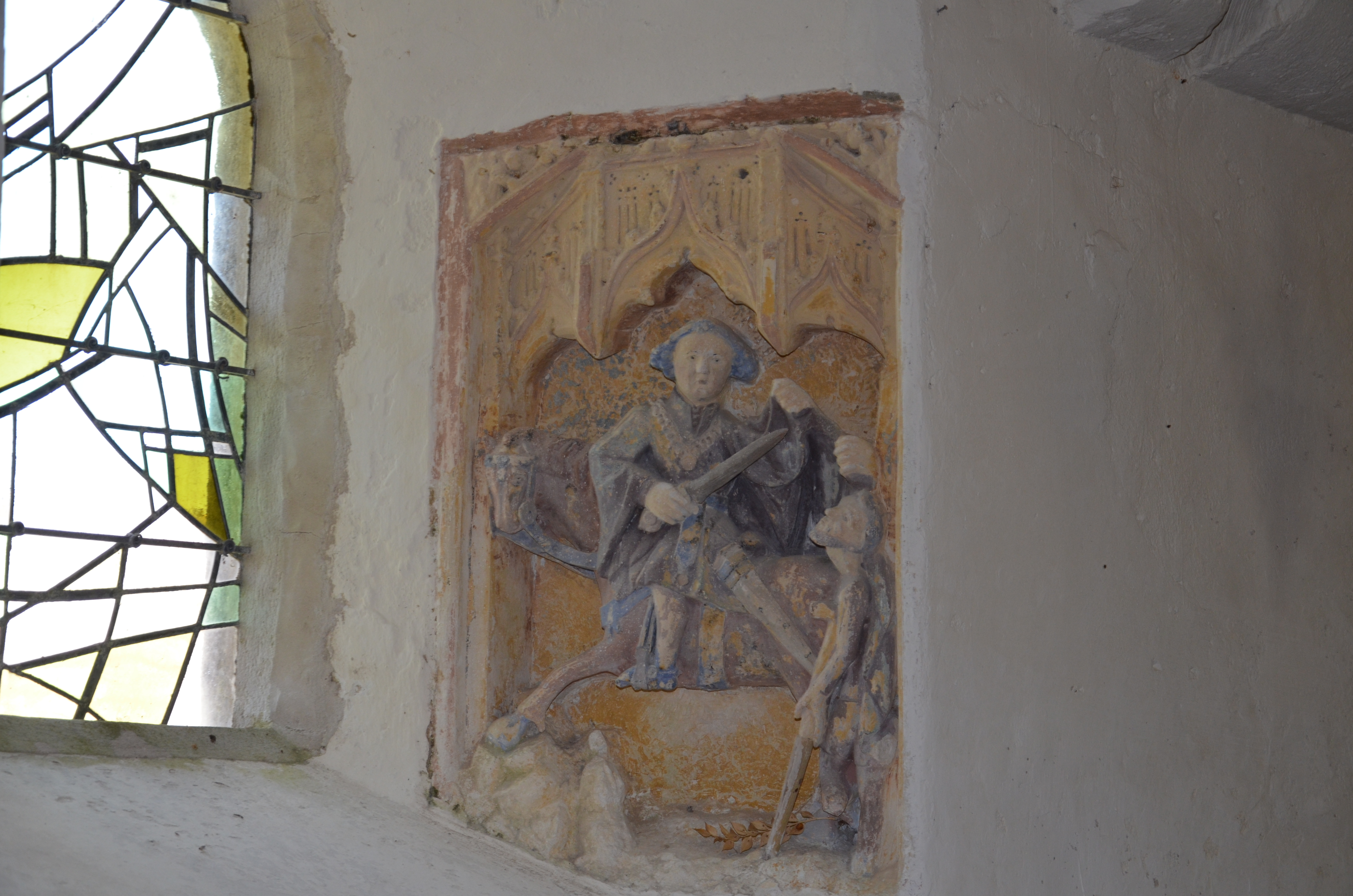 Bas-relief représentant la Charité de Saint Martin en l'église Saint-Martin d'Éculleville.